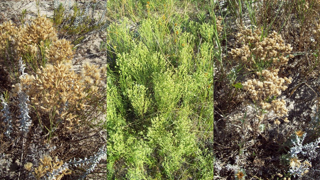 Baccharis genistifolia. Asteraceae. Fotos tomadas en suelo arenoso al margen del Río de la Plata en Carrasco y en el Balneario San Luis, departamento de Canelones, Uruguay.